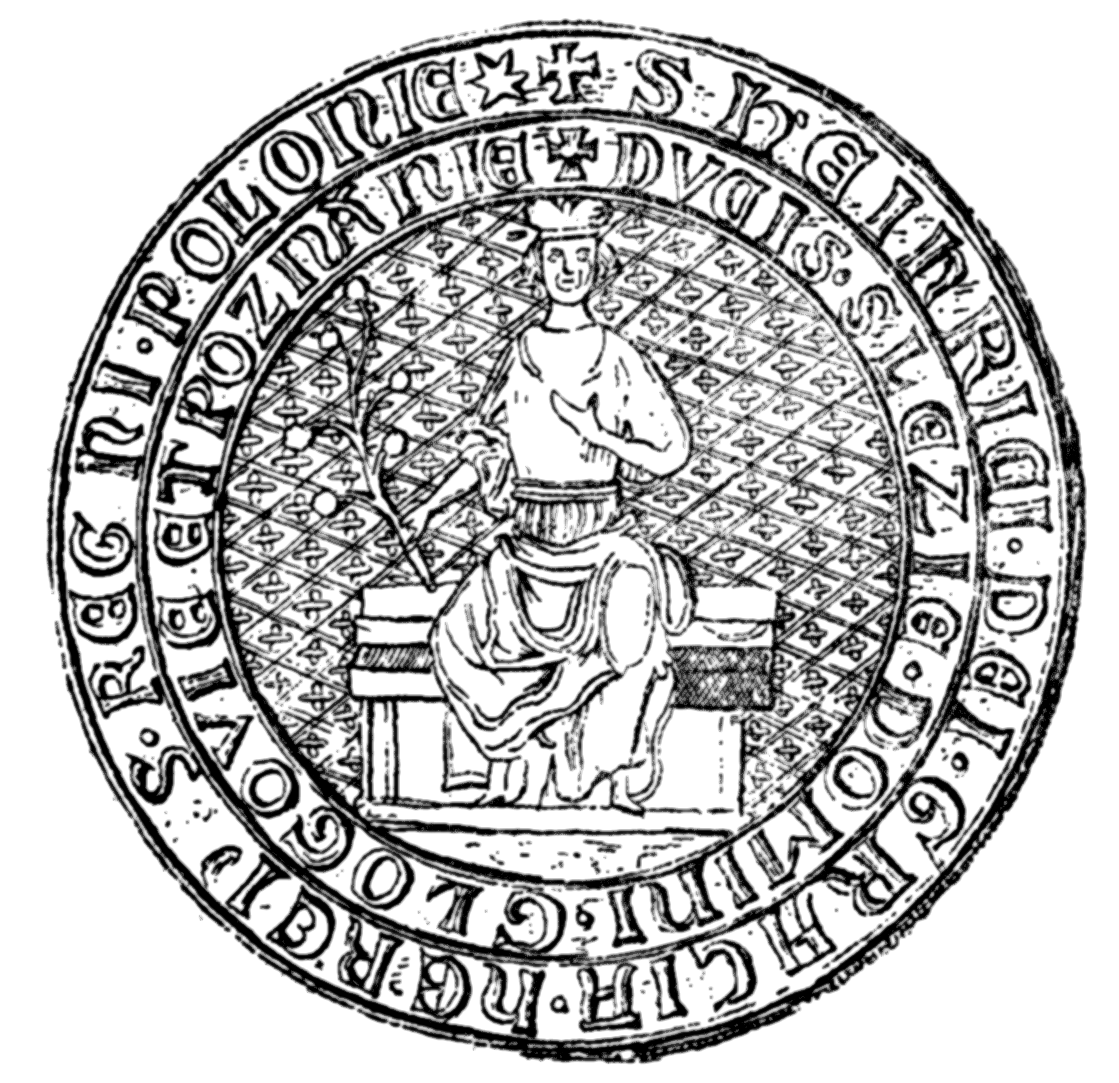 Henryk IV Wierny seal